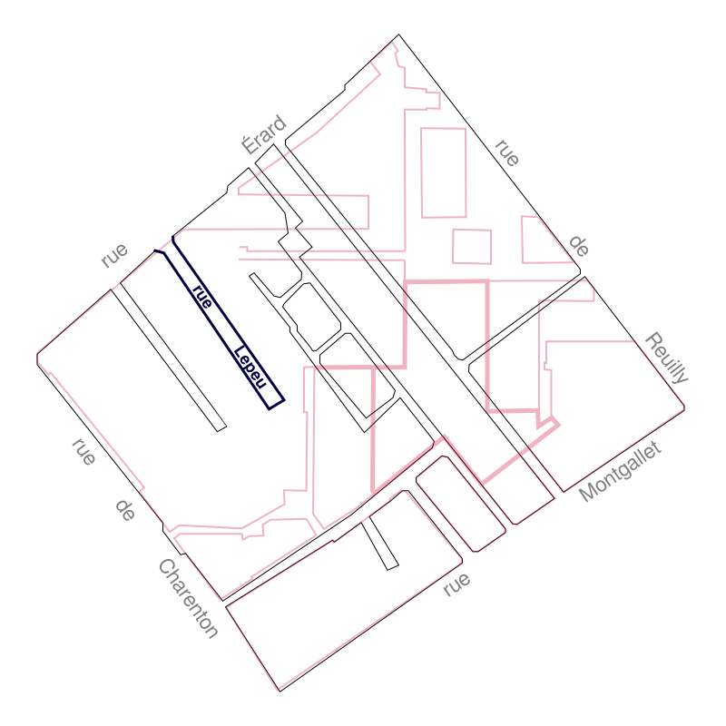 Plan de l'îlot Saint-Éloi avant l'opération de rénovation (1958-1977) avec en superposition le nouveau tracé des rues, en particulier la rue Lepeu